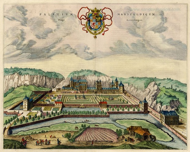 Vue gravée du château La Fontaine à Clausen